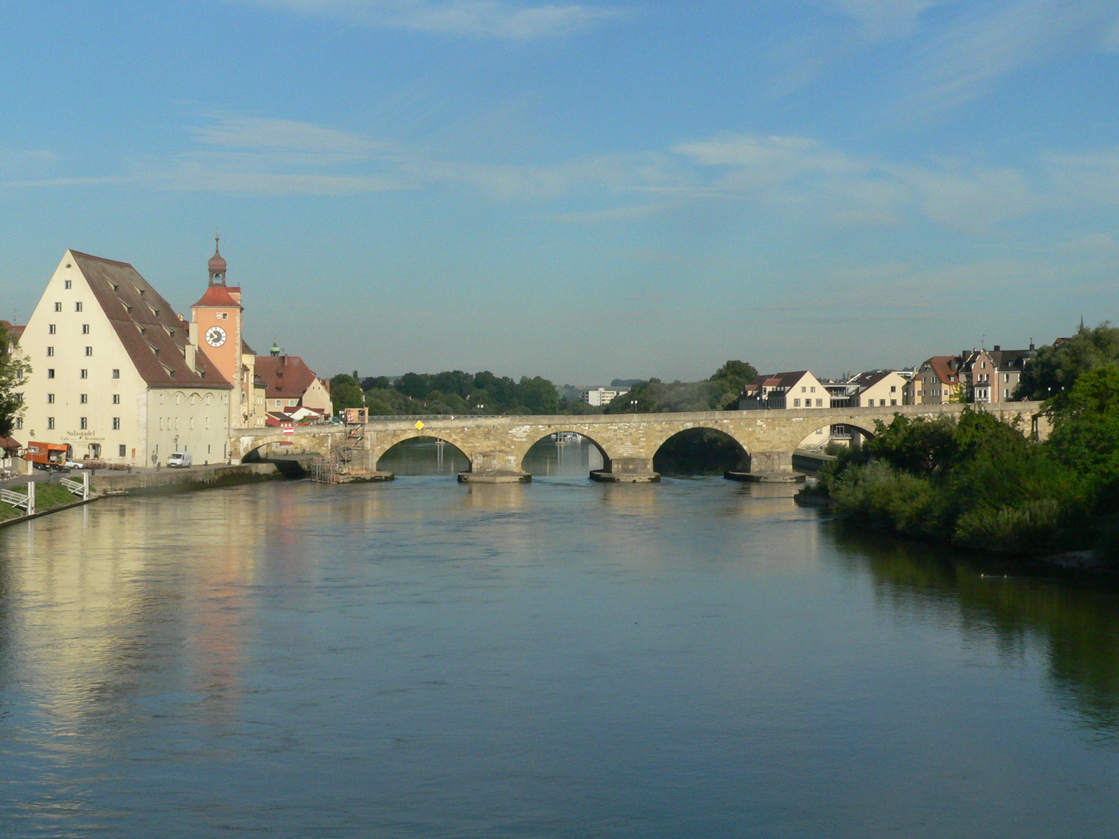 Die Donau bei Regensburg